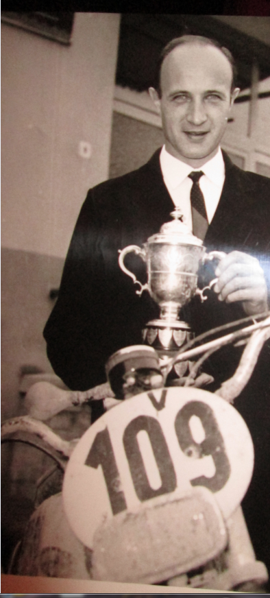 Foto s trofejí